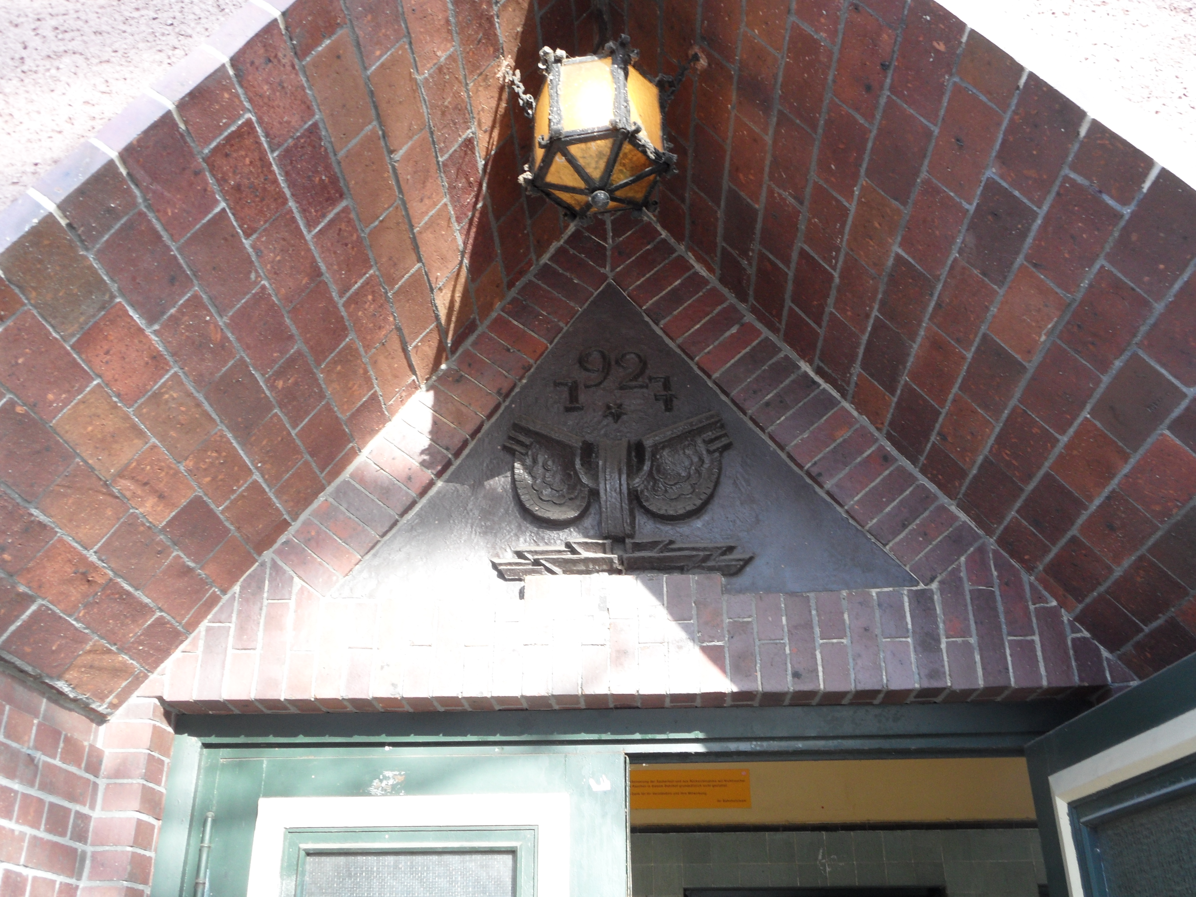 Berlin - Bahnhof Wannsee